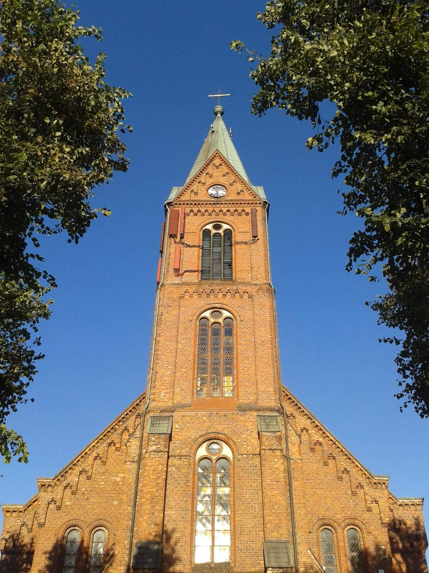 Gliwice, Plebania z XVIII wieku (około 1740 roku), murowana, a dokładnie kościół pod wezwaniem Najświętszej Maryi Panny obok plebanii. Wikidata has entry Q30063678 with data related to this item.